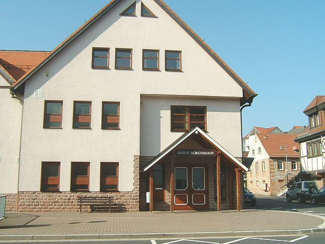 Rathaus und Bürgerhaus in Oberndorf (Spessart). Das Rathaus ist Sitz der Gemeindeverwaltung von Jossgrund. Selbst fotografiert am 14.10.05 --Peng 16:20, 14 October 2005 (UTC)